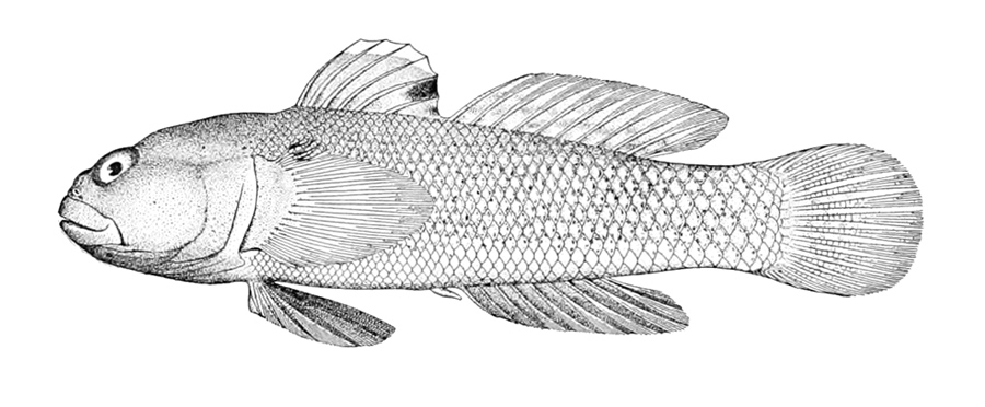 Bathygobius panayensis syn. Gobius panayensis